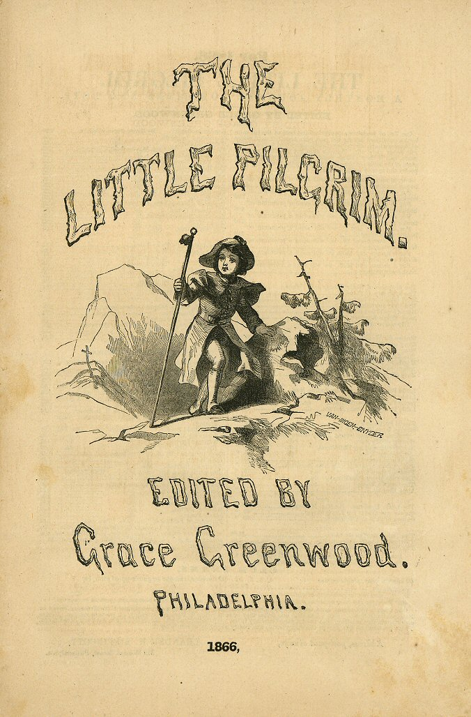 Little Pilgrim masthead 1866